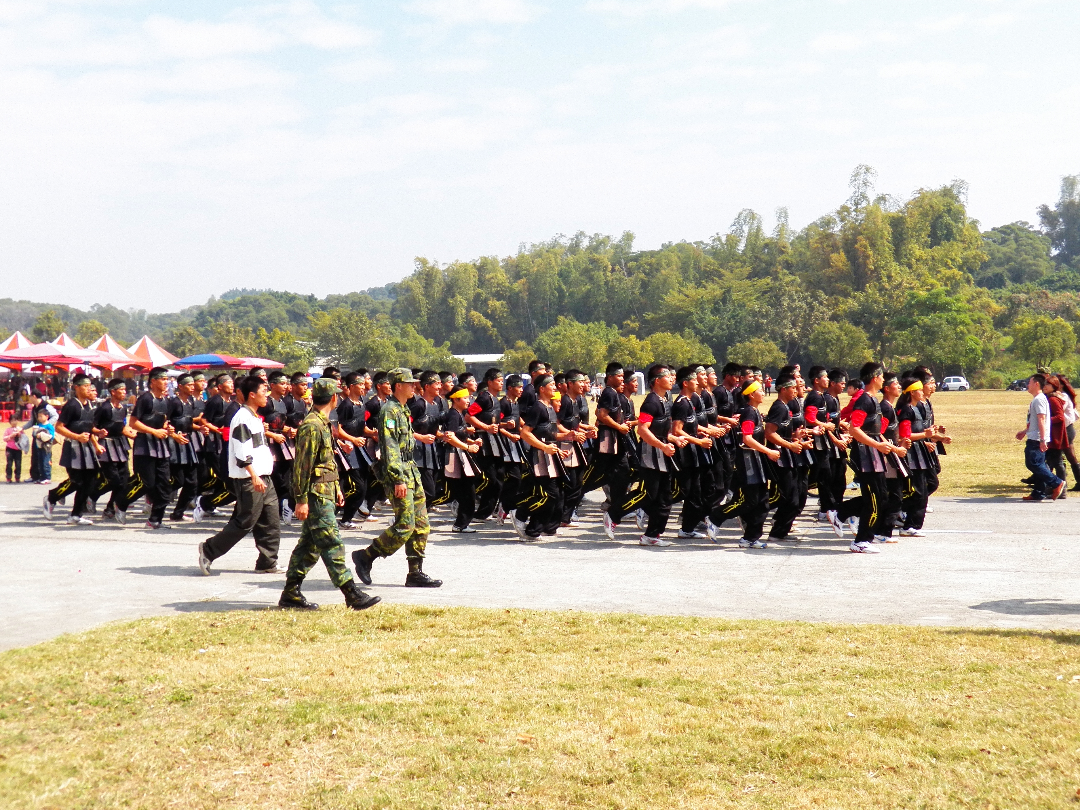 2012年陸軍步兵學校營區開放活動表演結束，表演刺槍術的體幹班學員，列隊跑步至校舍換裝。